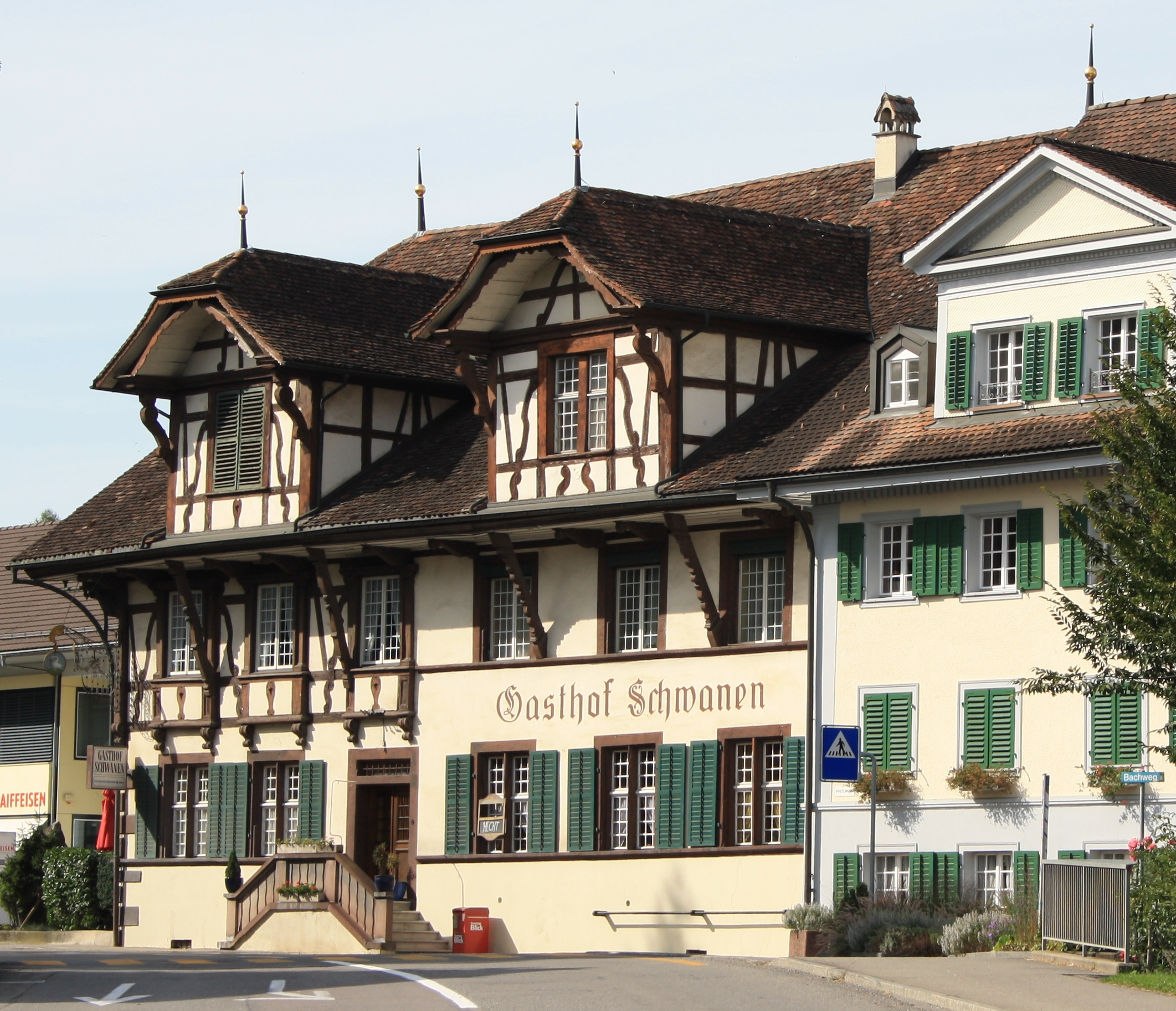 Gasthof Schwanen, Merenschwand,Schweiz